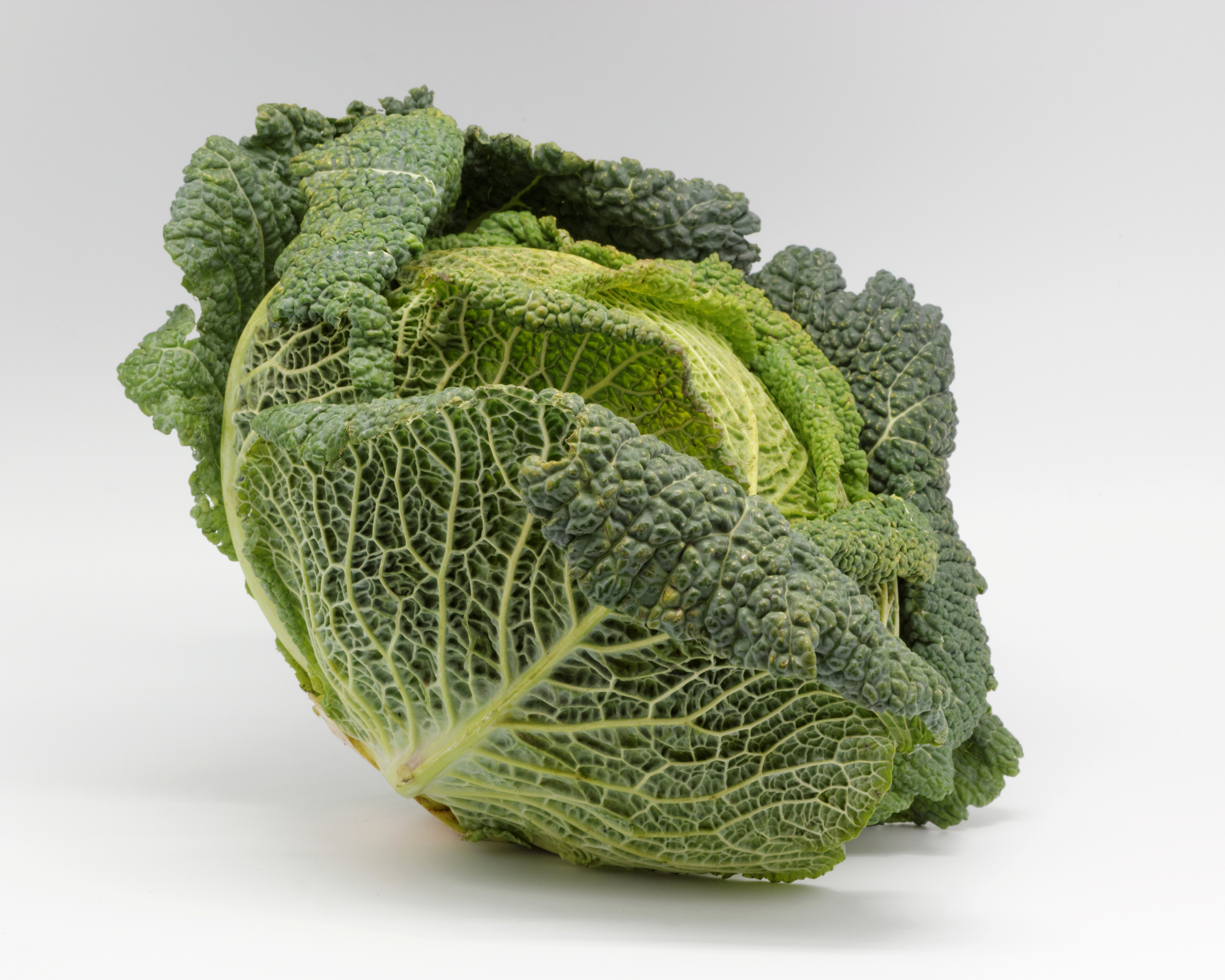 Brassica oleracea var. sabauda